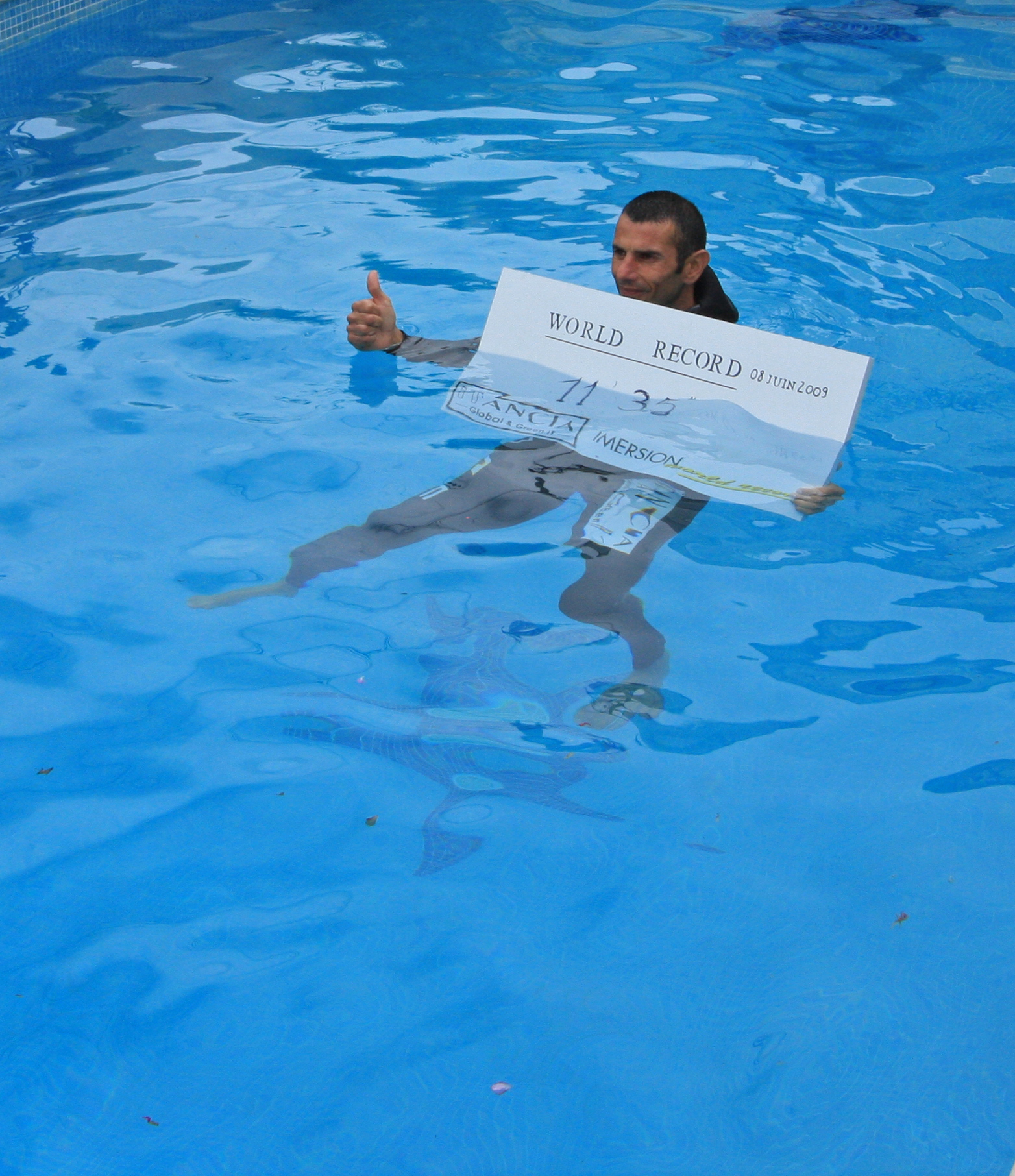 Photo souvenir du titre de Record du Monde d'Apnée Statique de Stéphane Mifsud en juin 2009 qu'il a décroché en retenant son souffle 11 minutes 35 secondes.